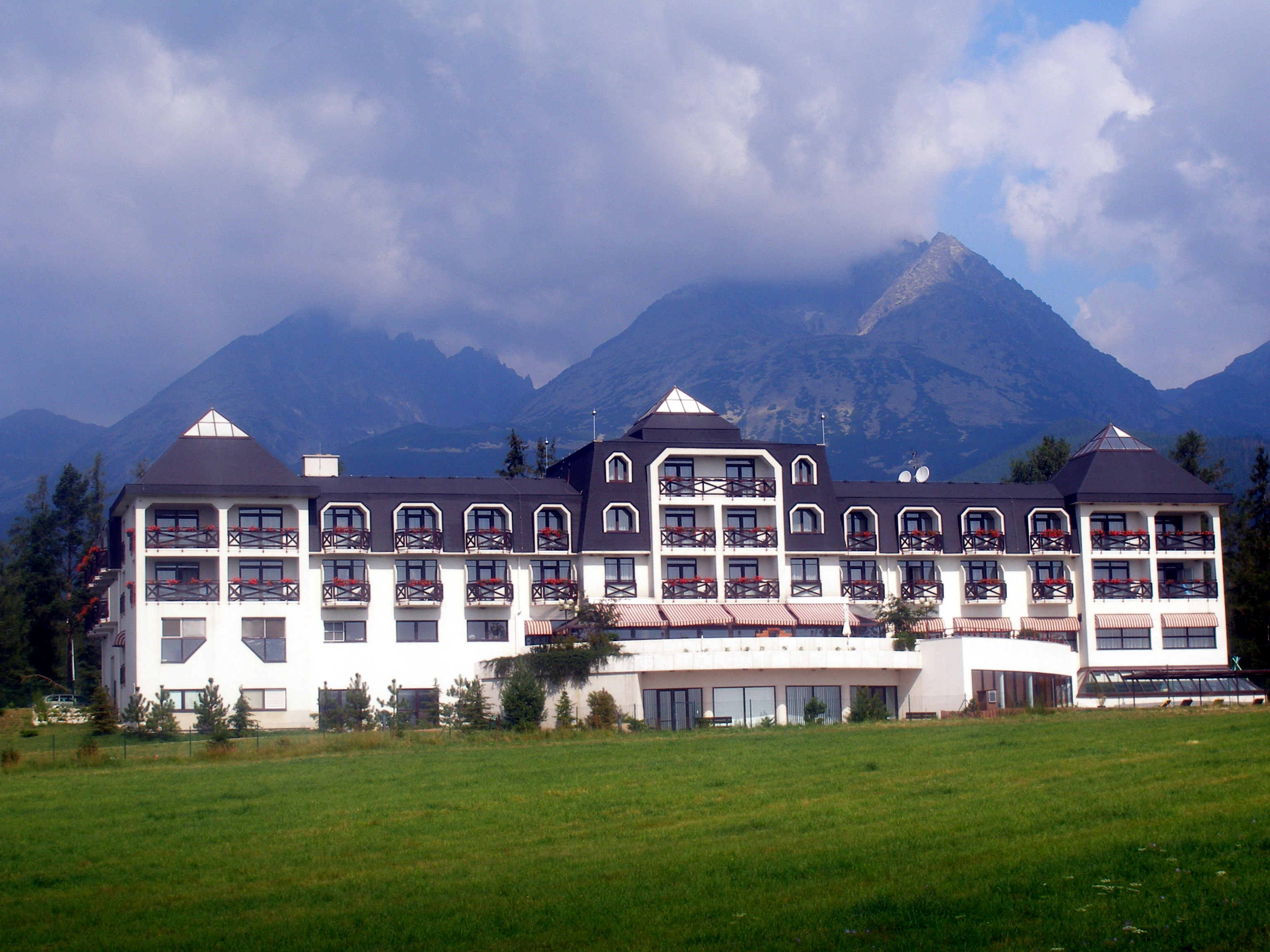 Hotel Hubert